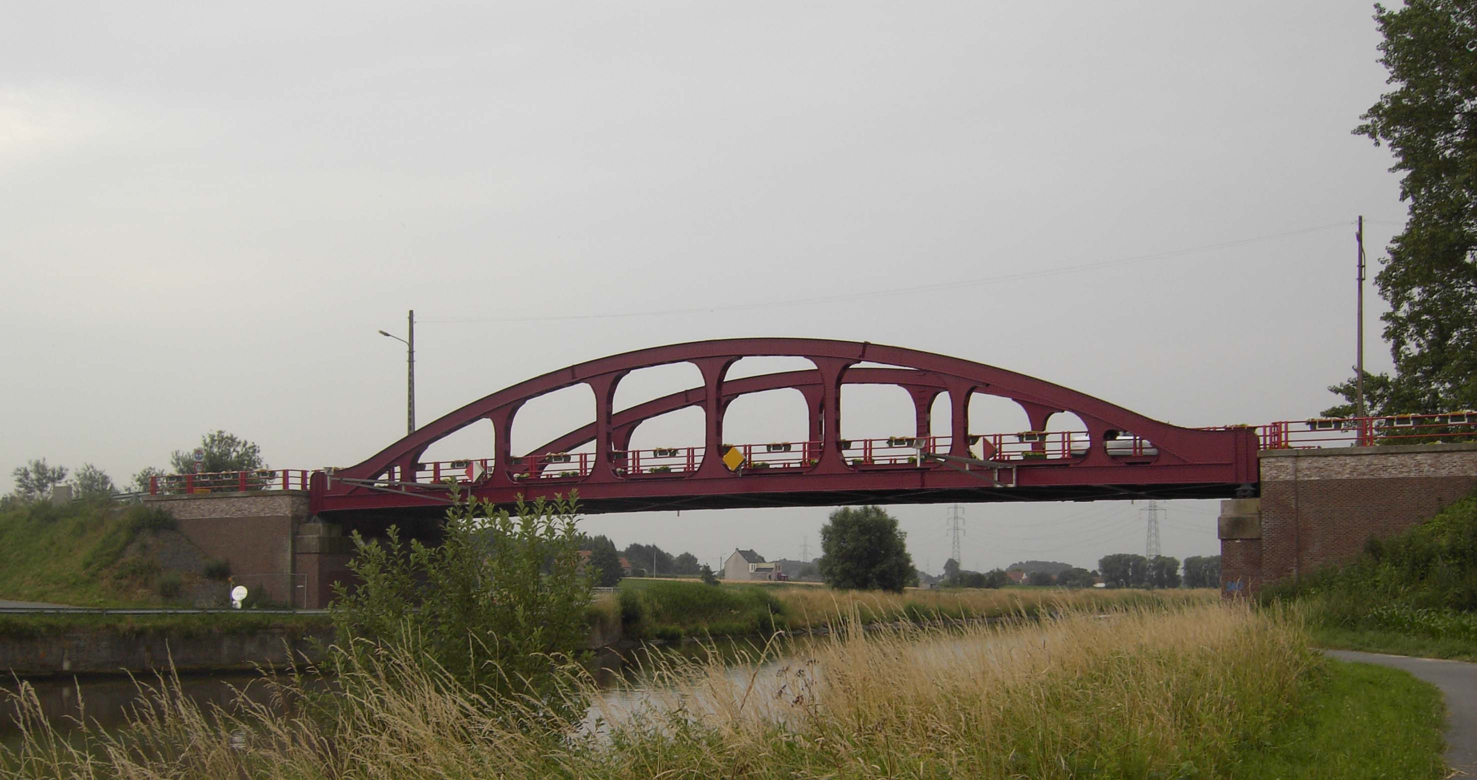 Huidige brug tussen over de Schelde tussen Rugge (Avelgem in West-Vlaanderen) en Ruien (Kluisbergen in Oost-Vlaanderen) - Vlaanderen - België